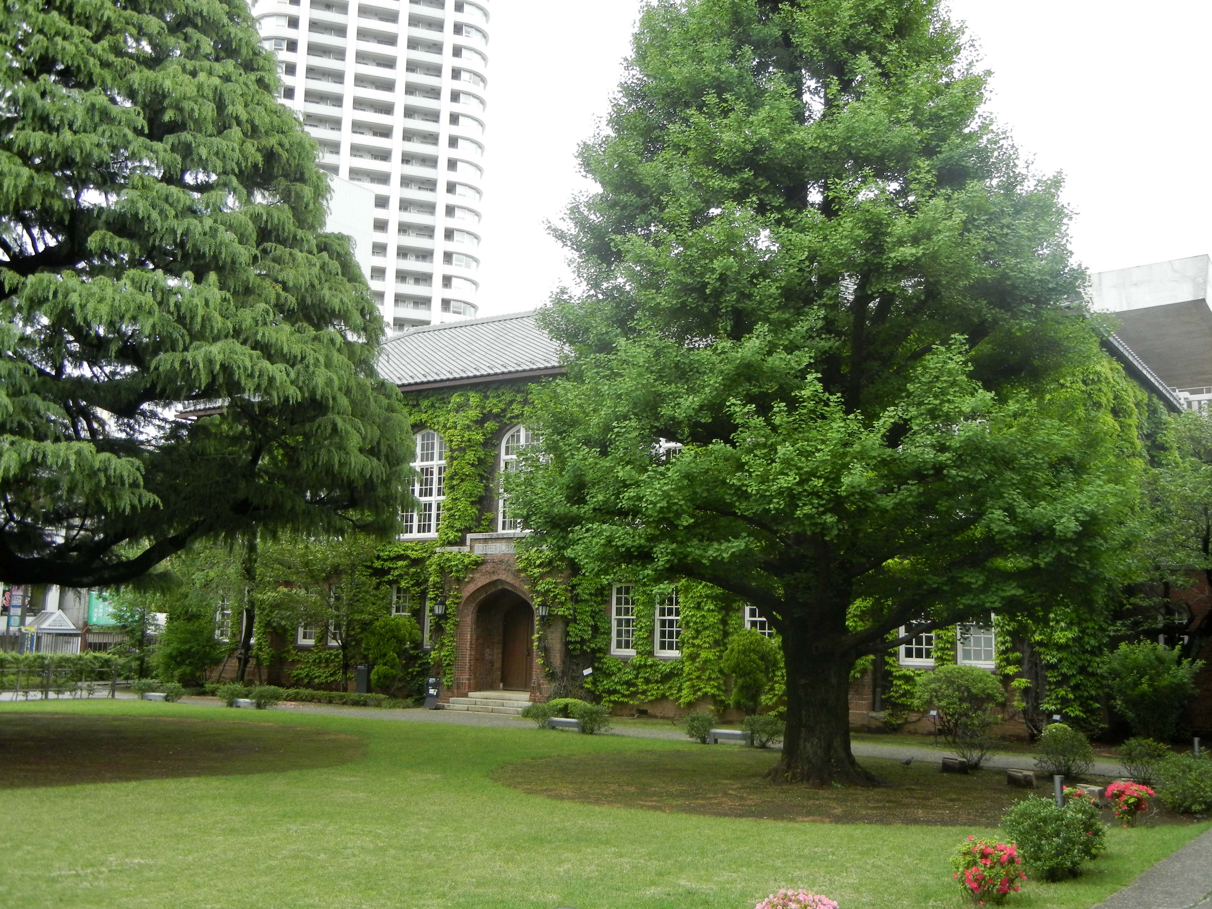 立教大学池袋キャンパス図書館本館（旧館）